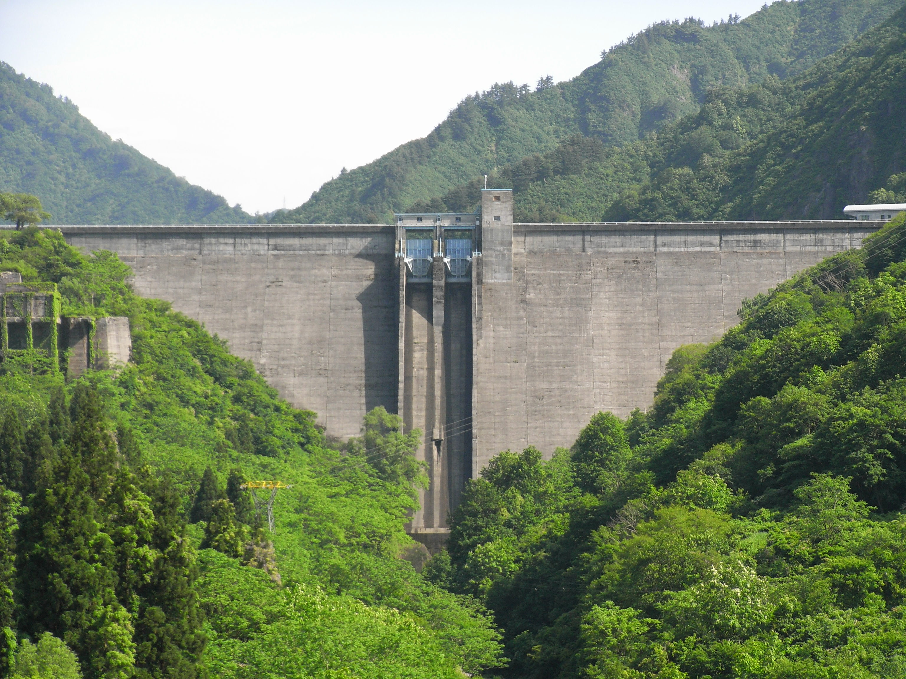 Dam